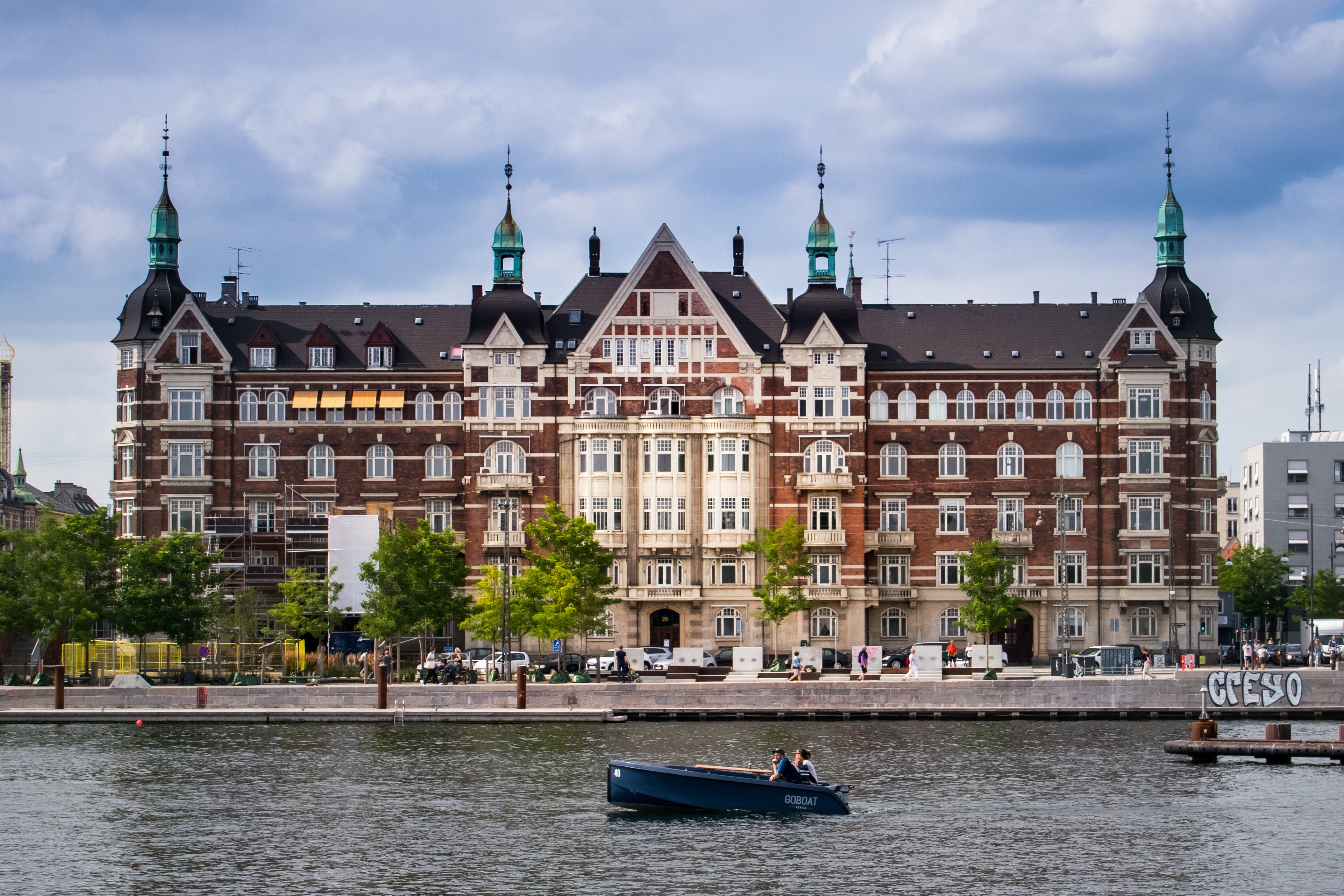 Ny Christiansborg in Copenhagen, Denmark